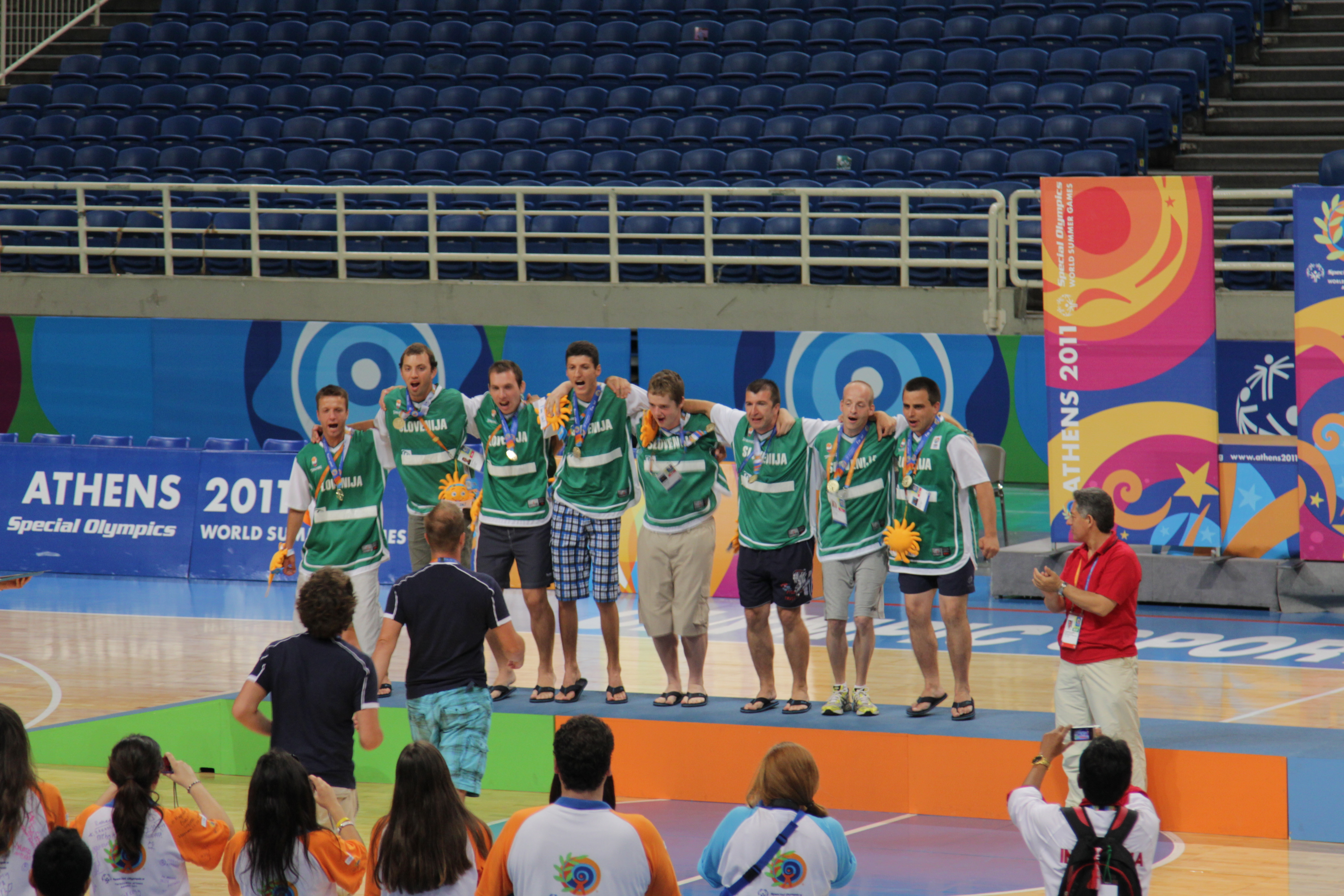 ΟΑΚΑ Olympic Indoor Hall Special Olympics World Summer Games Athens 2011 3 July 2011. OAKA Olympic Stadiums "Let me Win! But if I Cannot win, Let me be brave in the attempt!" --- Τελετή Απονομής - Καλαθοσφαίριση ΟΑΚΑ Ολυμπιακό Κλειστό Γήπεδο Καλαθοσφαίρισης Παγκόσμιοι Αγώνες Special Olympics ΑΘΗΝΑ 2011 3 Ιουλίου 2011, ΟΑΚΑ. "Θέλω να νικήσω! Αν όμως δεν τα καταφέρω βοηθήστε με να προσπαθήσω με θάρρος!"